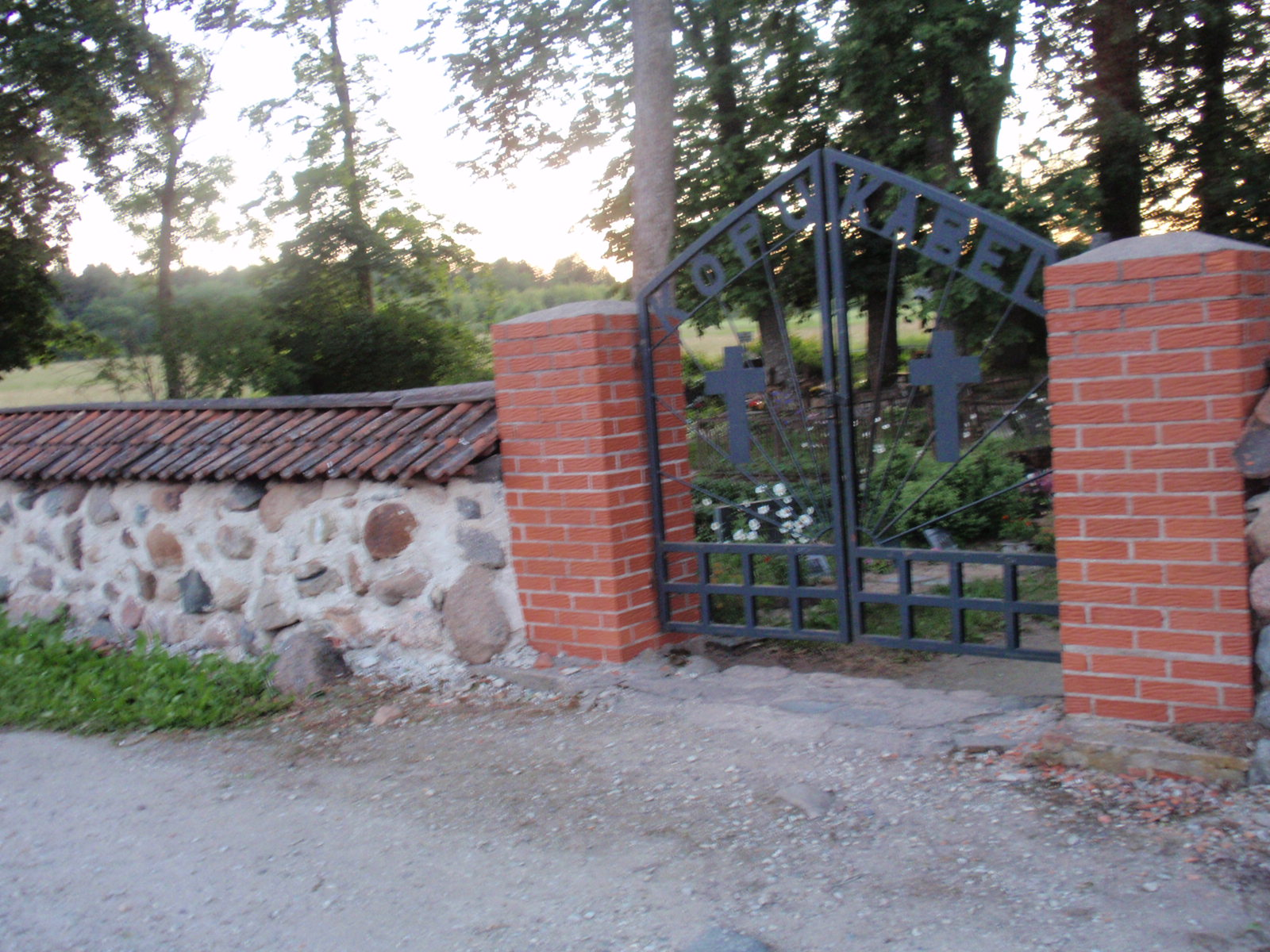 Kõpu surnuaia müür